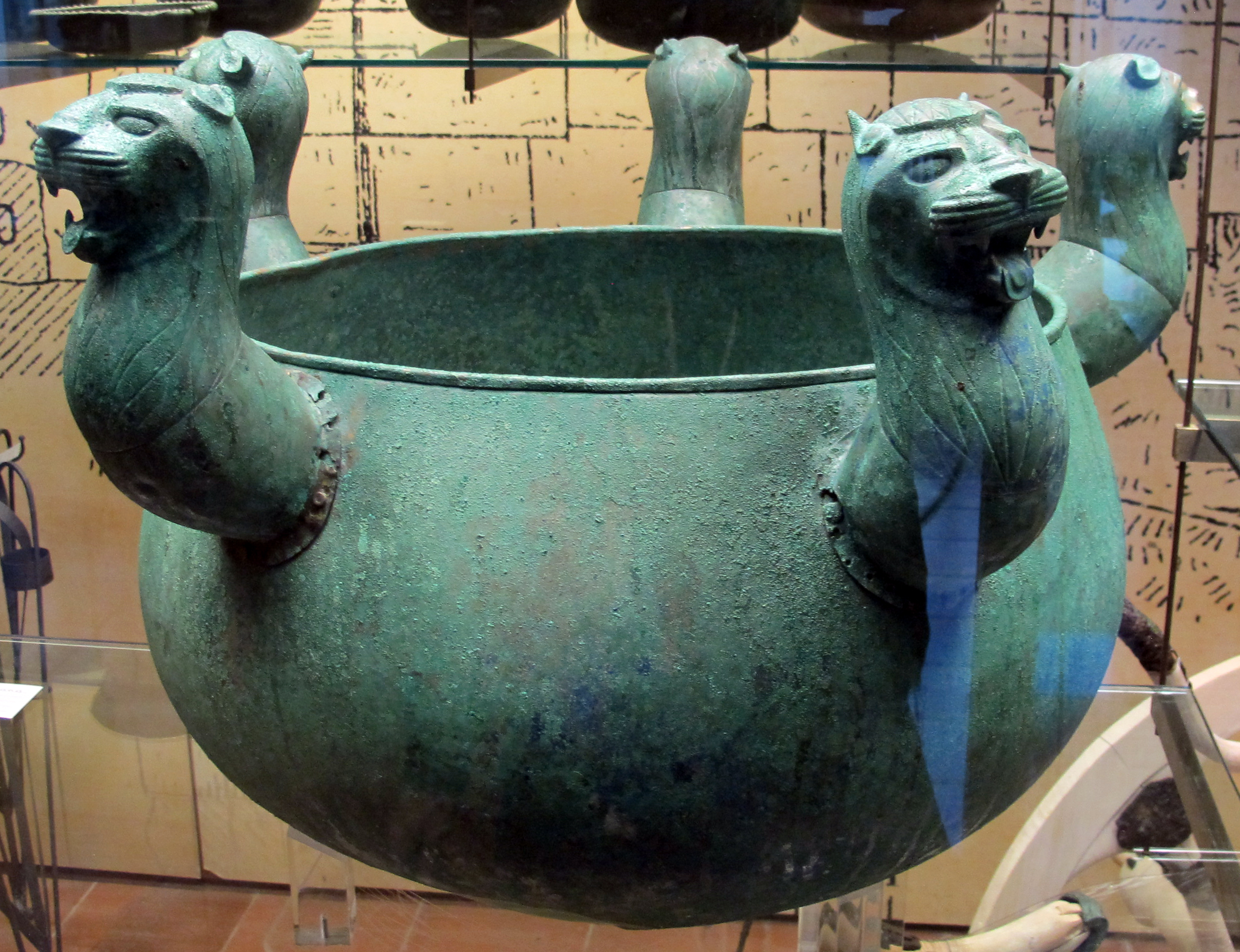 Museo Gregoriano Etrusco